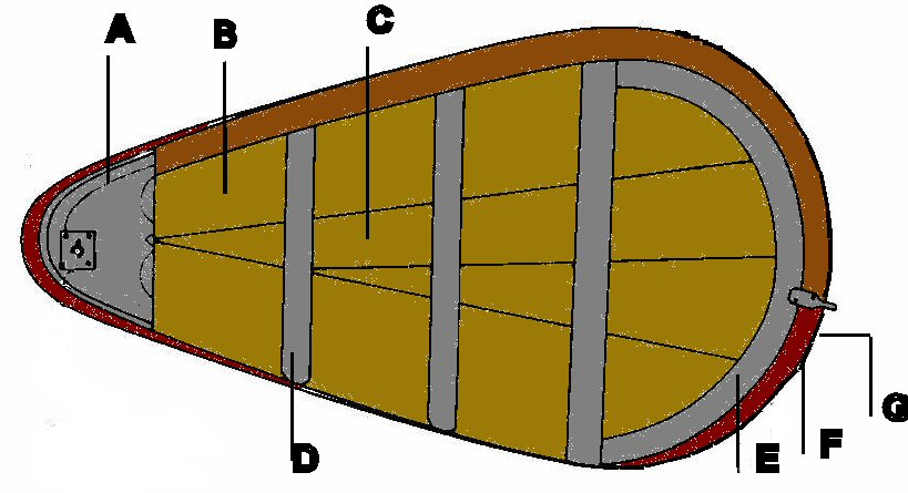 eigen tek.